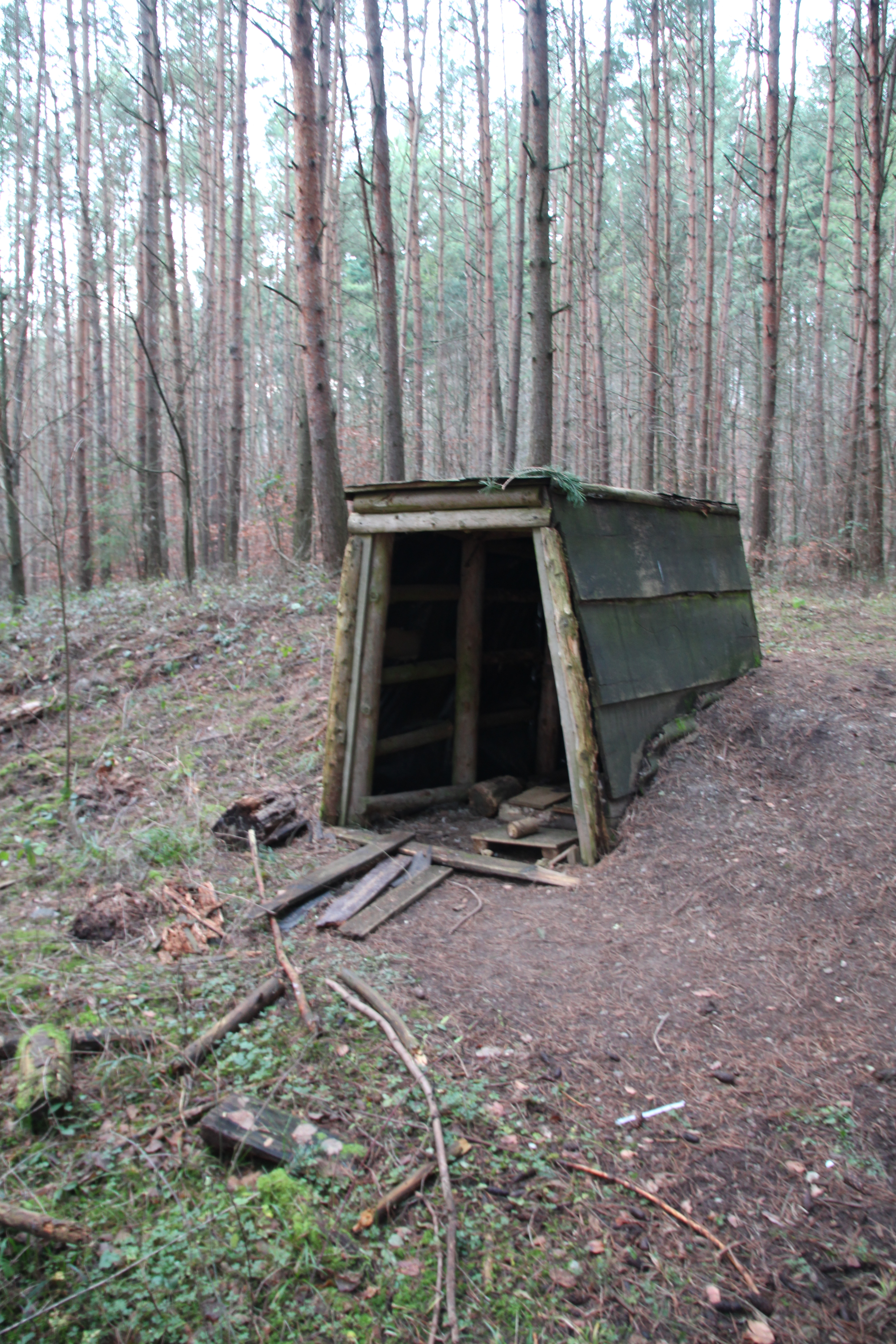 Grube Friedberg bei Fellingshausen